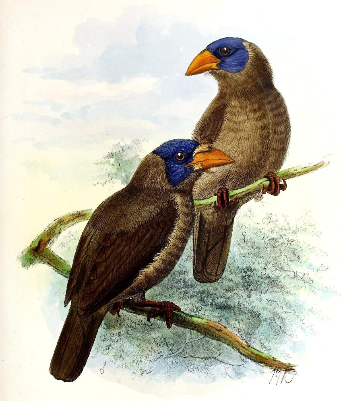 GYMNOBUCGO CALVUS.